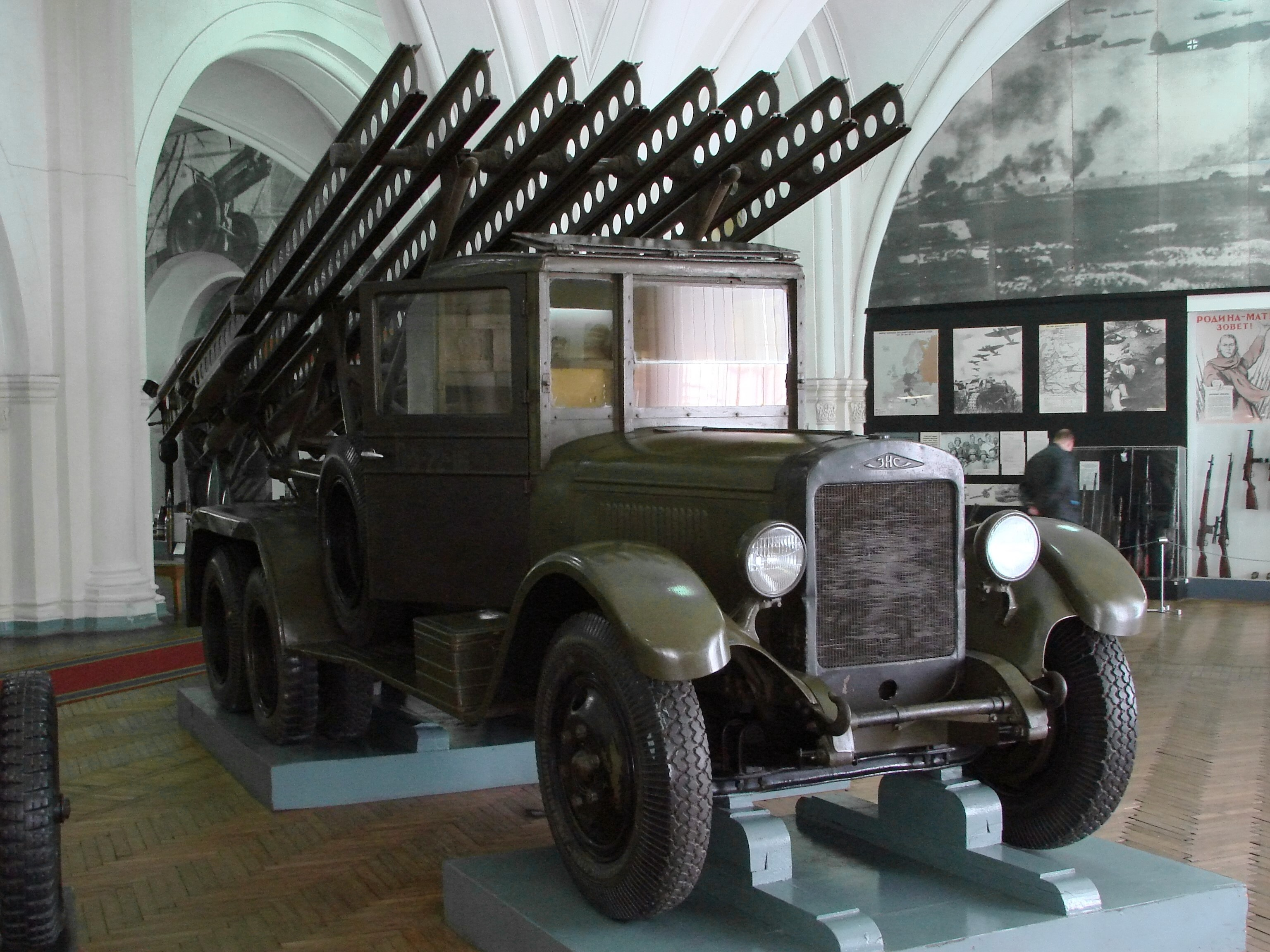 Katyusha Rocket Launcher - Artillery Museum - St. Petersburg - Russia.jpg